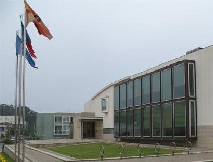 Foto da Biblioteca Municipal de Vila do Conde